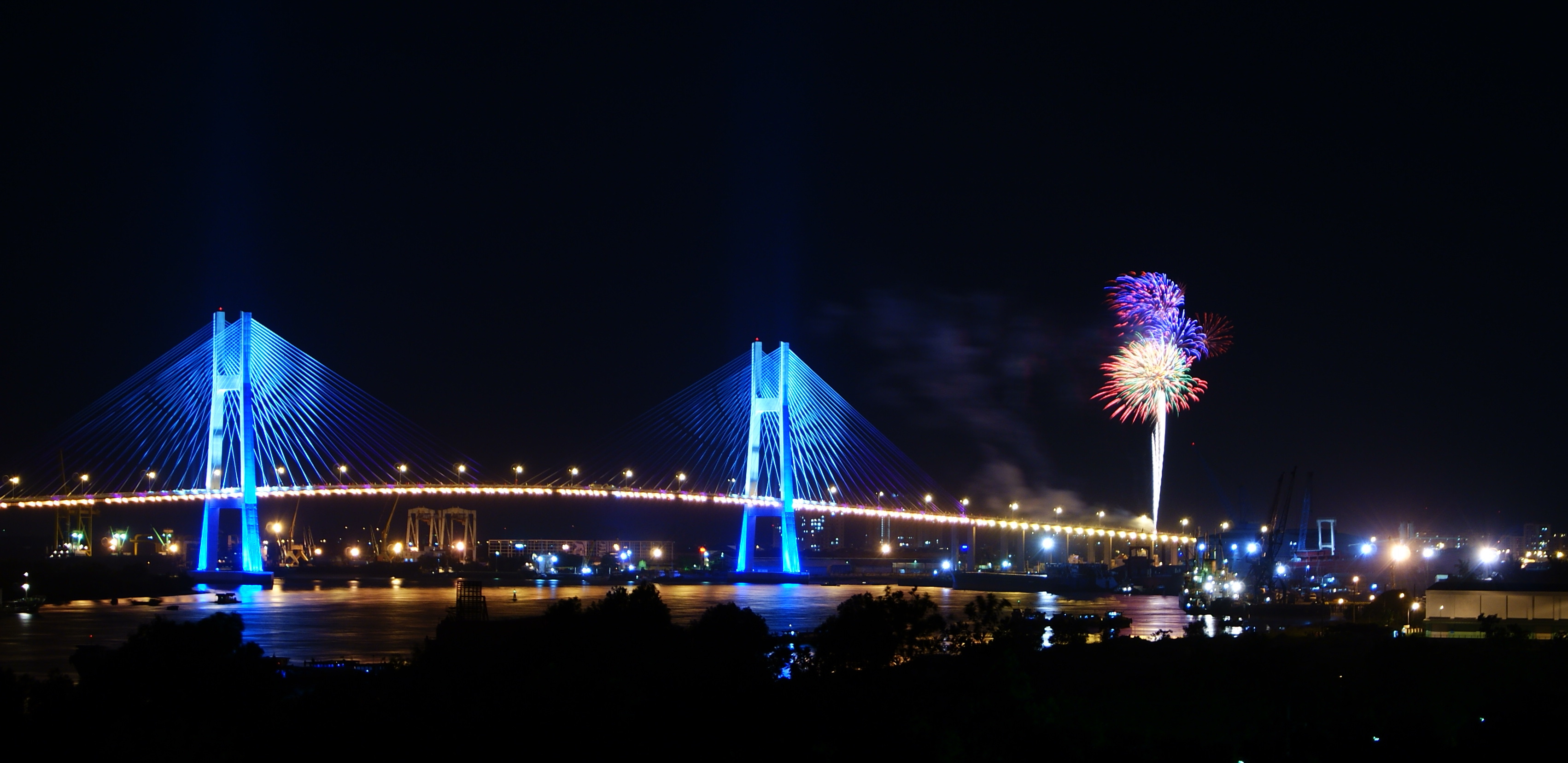 Hình ảnh cầu Phú Mỹ (nối liền quận 2 và quận 7) ở Thành phố Hồ Chí Minh trong đêm bắn pháo hoa chào mừng Quốc khánh 2-9-2009.